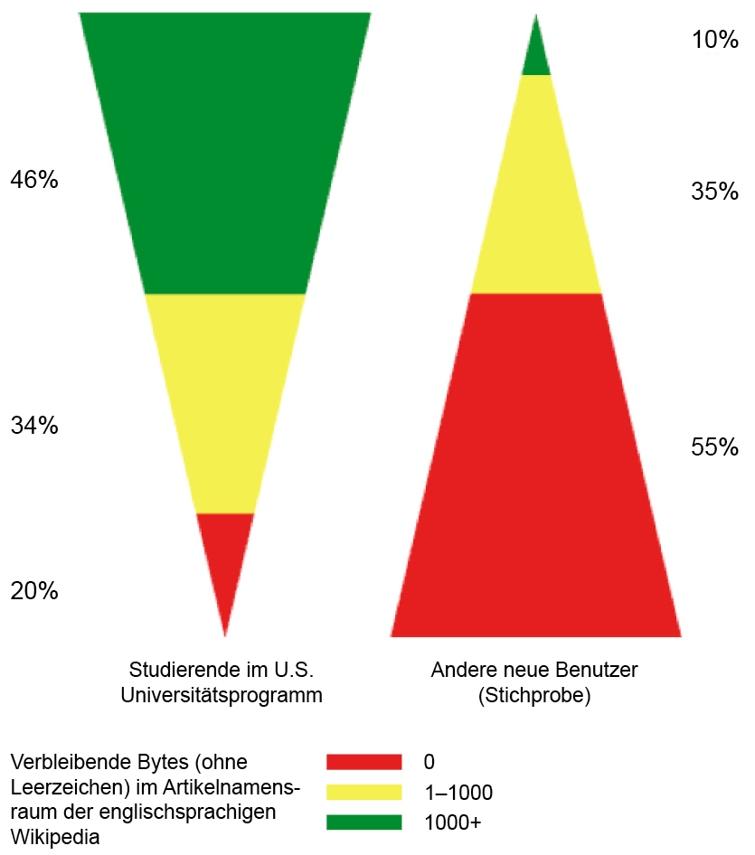 Verteilung der im Artikelnamensraum der englischsprachigen Wikipedia verbleibenden (überlebenden) Inhalte: Studierende des U.S. Universitätsprogrammes vs. Stichprobe anderer neuer Benutzer.